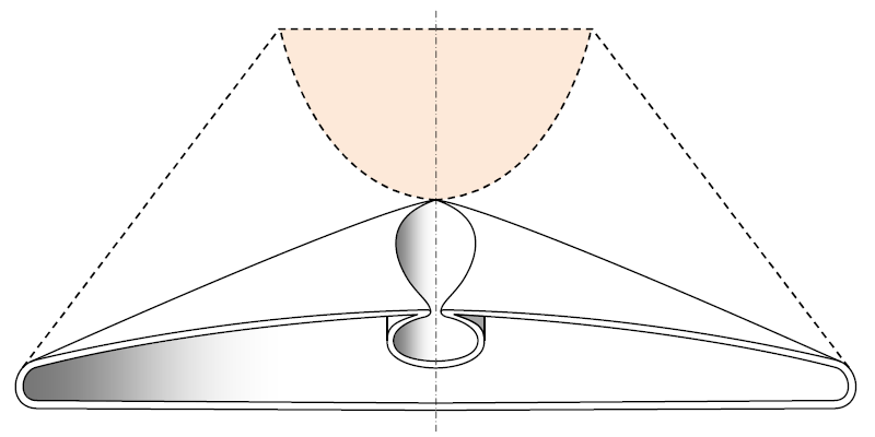 Облучатель Робинсона получается из тонкого трапециевидного рупора путём его формовки. Линейная горловина трапециевидного рупора изгибается, превращаясь в полную окружность.